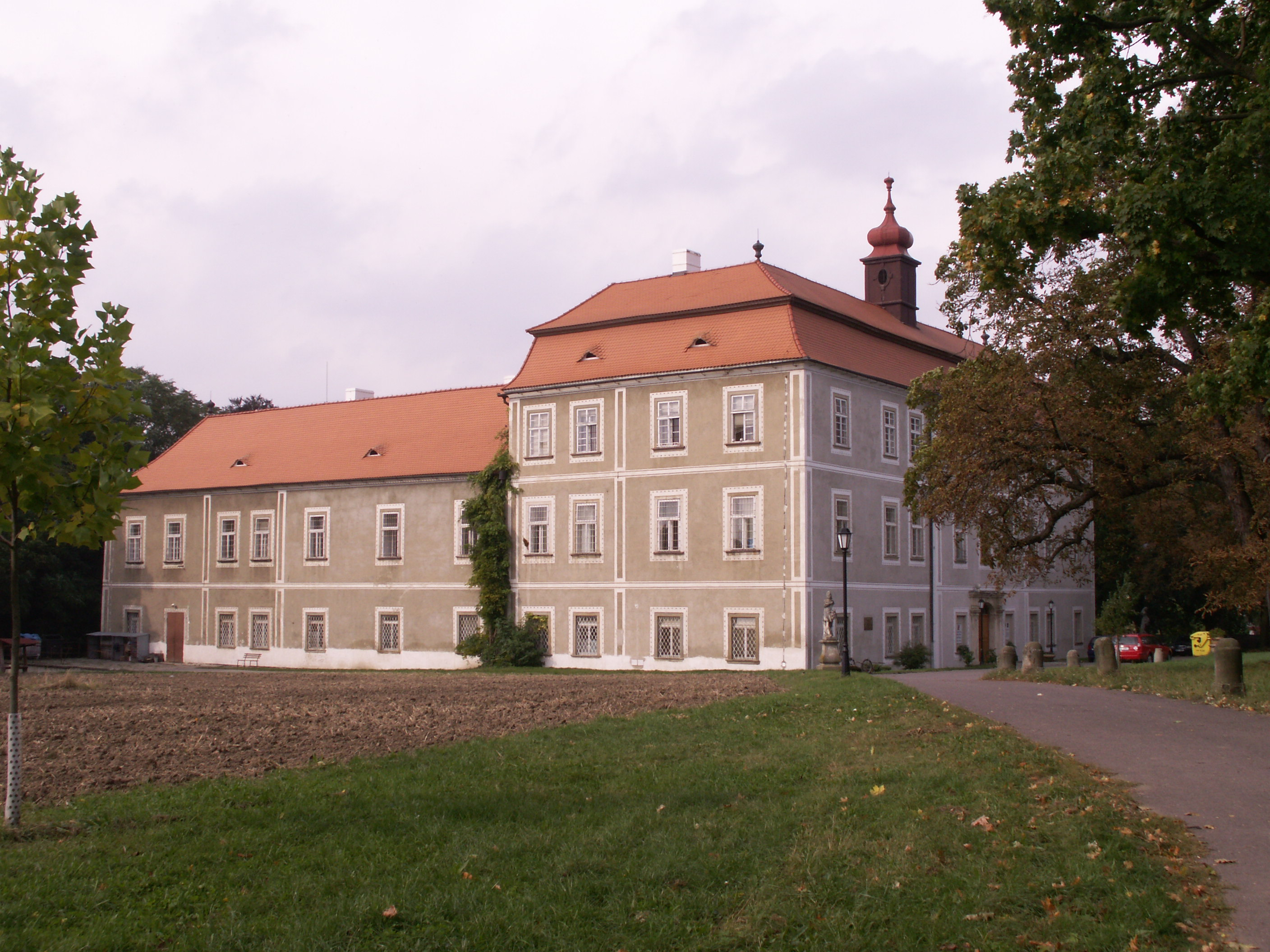 zámek Višňové (okres Znojmo)